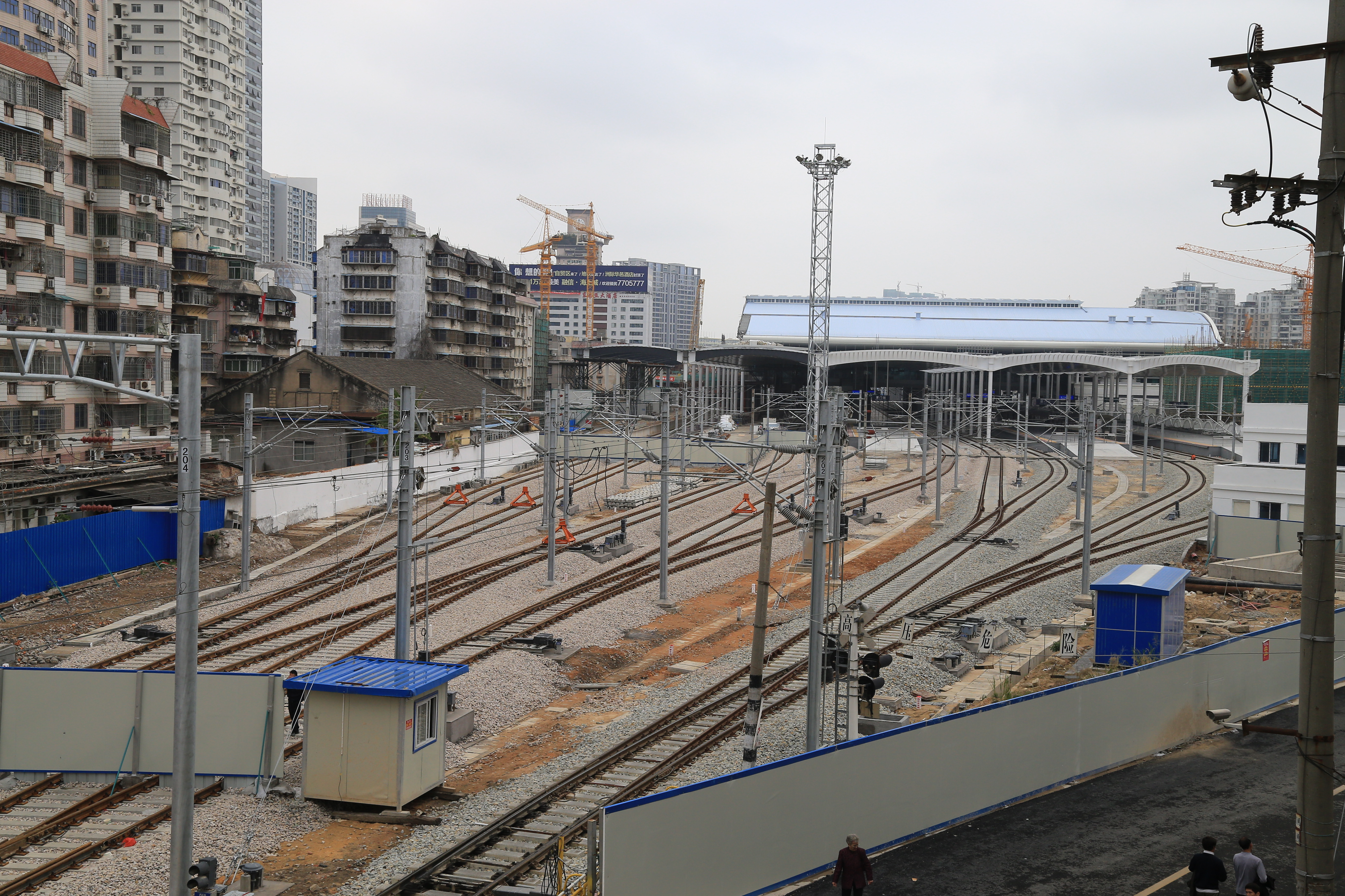 从金榜路上方远眺厦门站